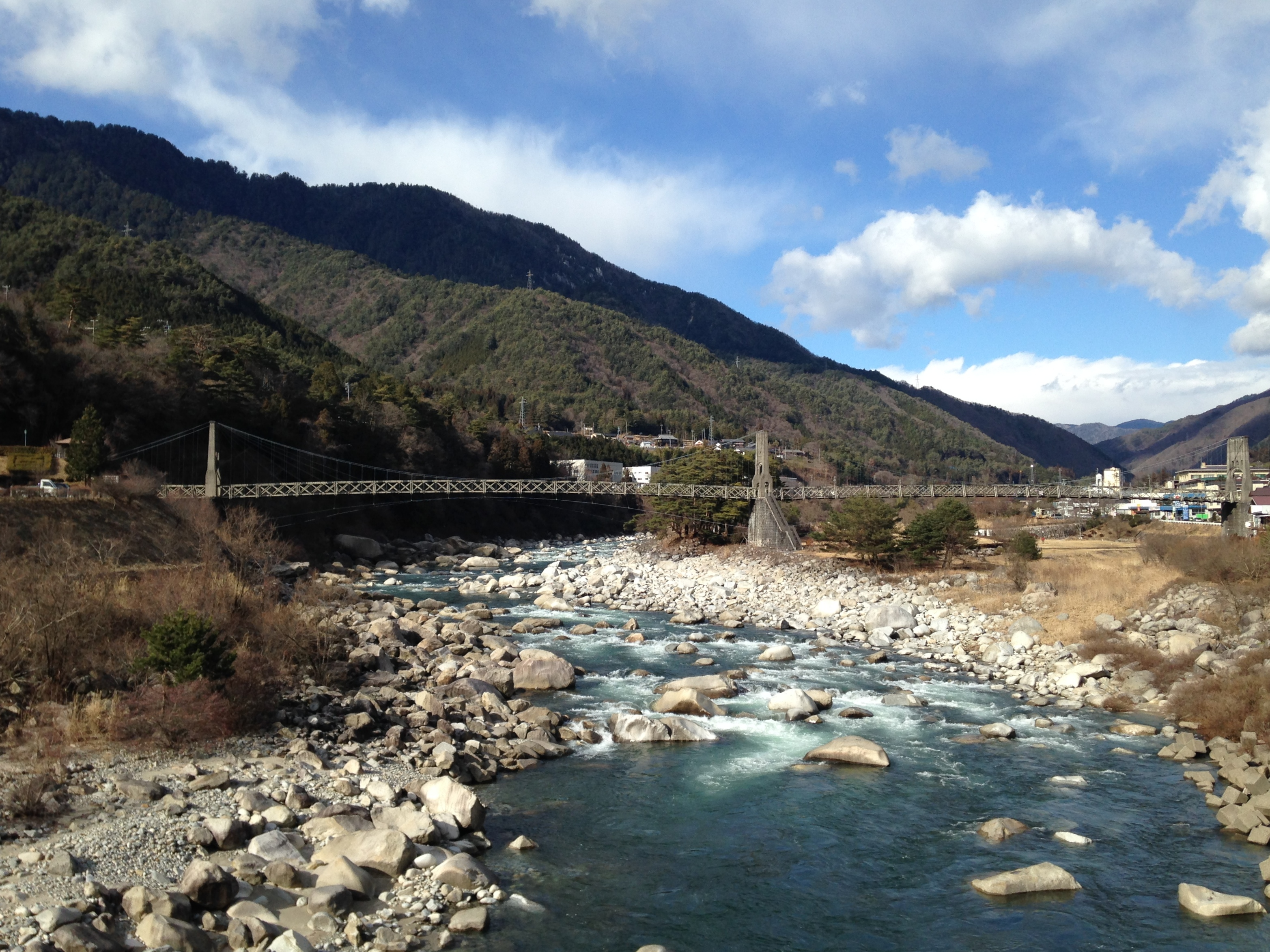 三留野大橋から望む木曽川と桃介橋